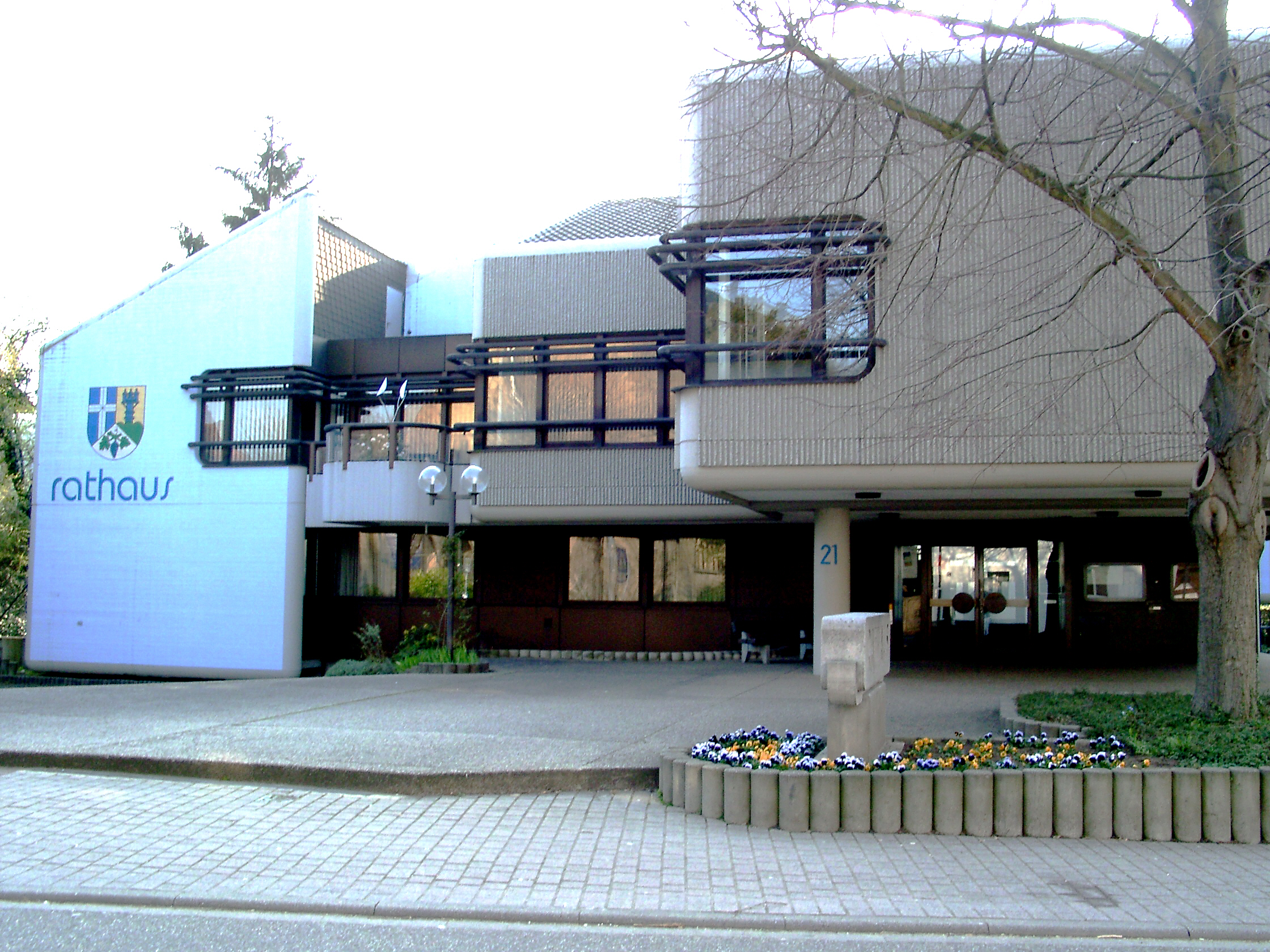 Rauenberg, Rathaus